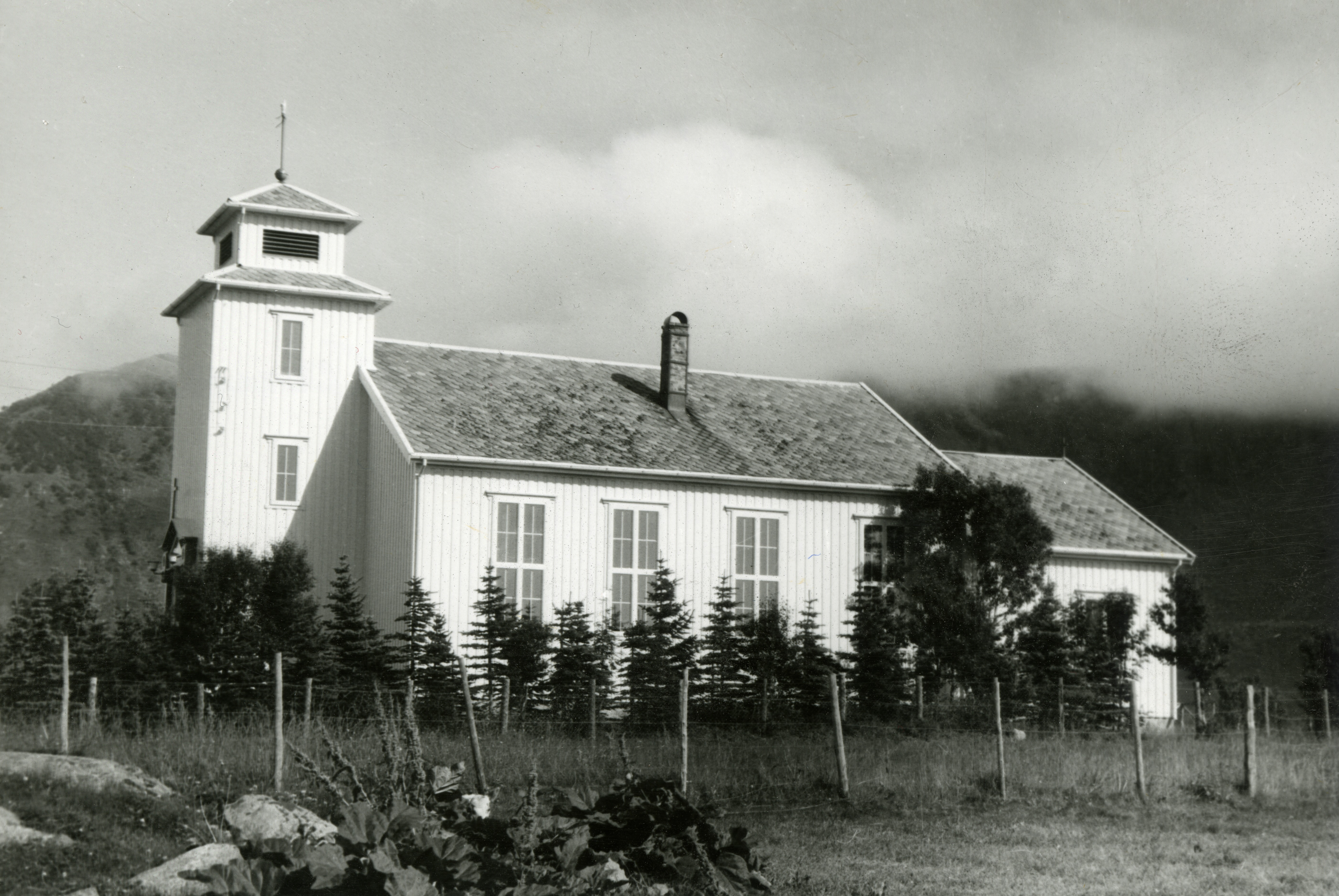 Bildet er hentet fra Nordlandsmuseet bildesamling etter Kanstad. Motivbeskrivelse: Laukvik kirke, (Strandlandet kirke), Lofoten Sted: Vågan, LOFOTEN, LAUKVIK